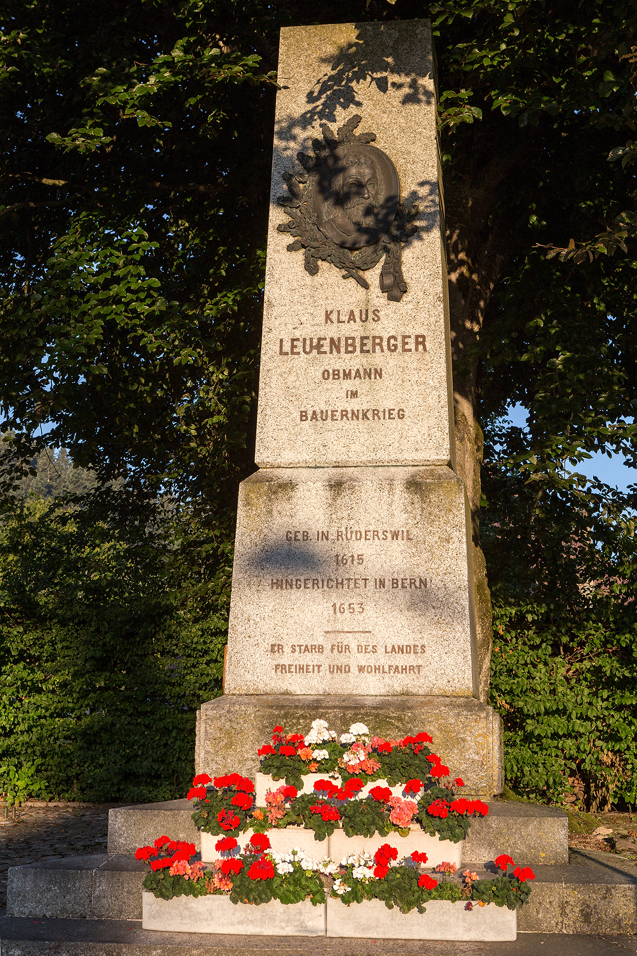 Denkmal in Rüderswil für den Bauernführer Klaus Leuenberger, der in Rüderswil geboren worden ist.